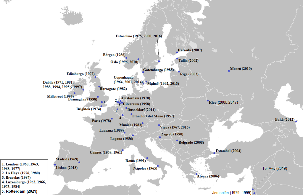 SEDES EUROVISION